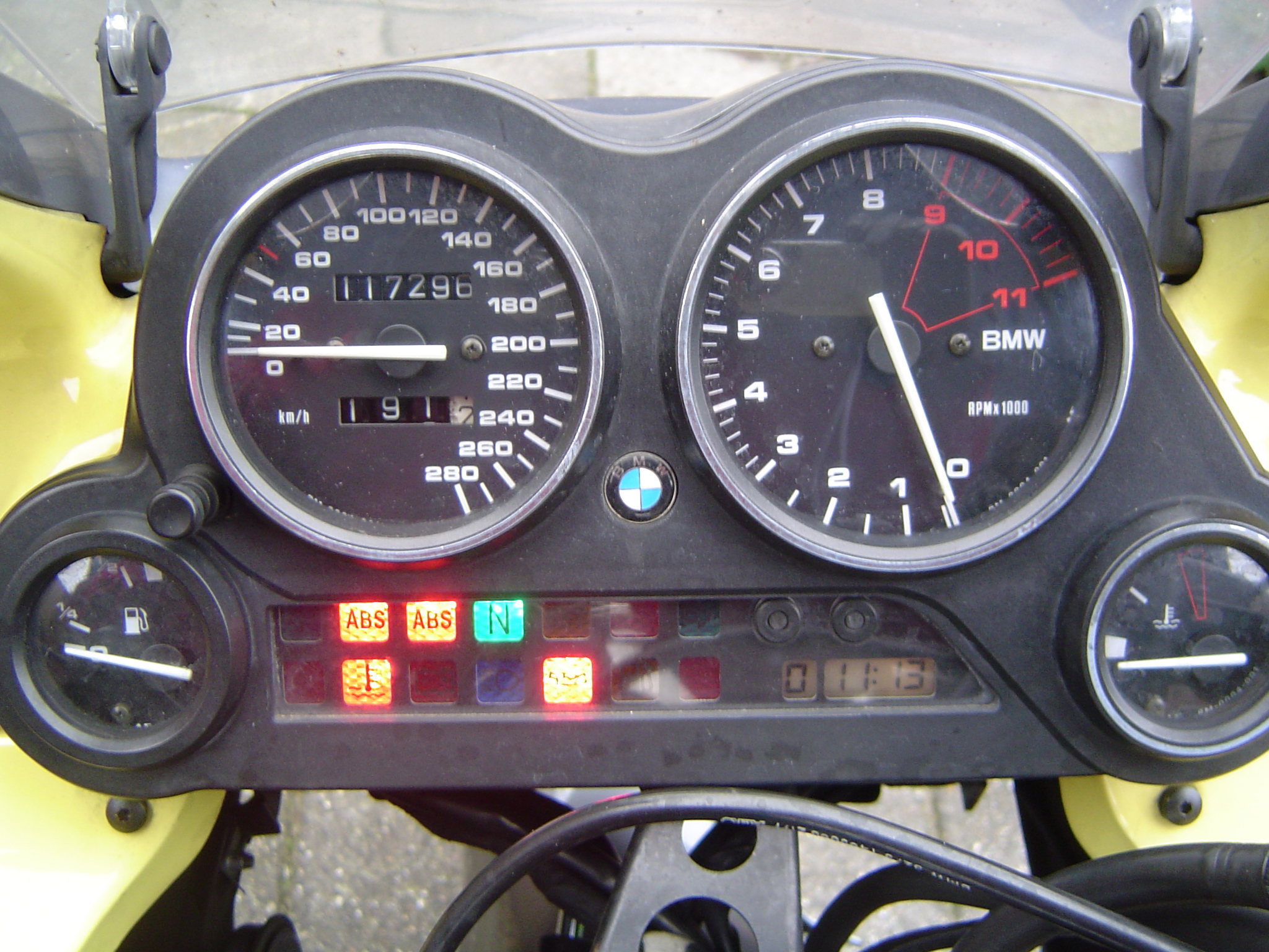 instrumentenpaneel van een motorfiets. Cockpit.